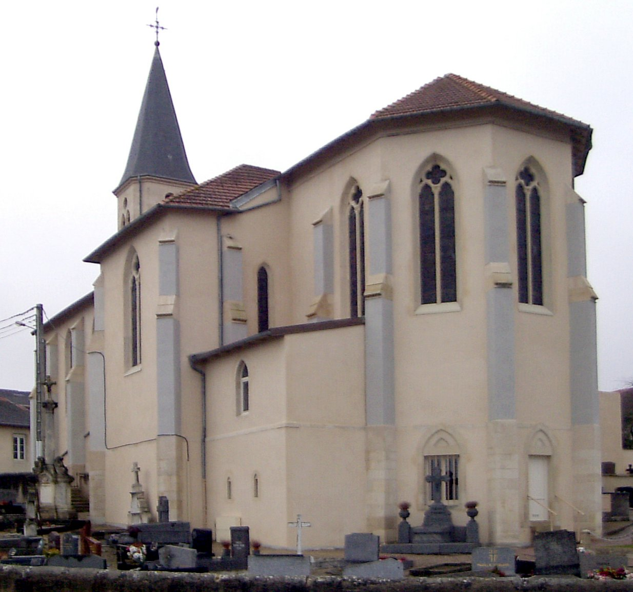 L'église Saint-Rémy à Xeuilley